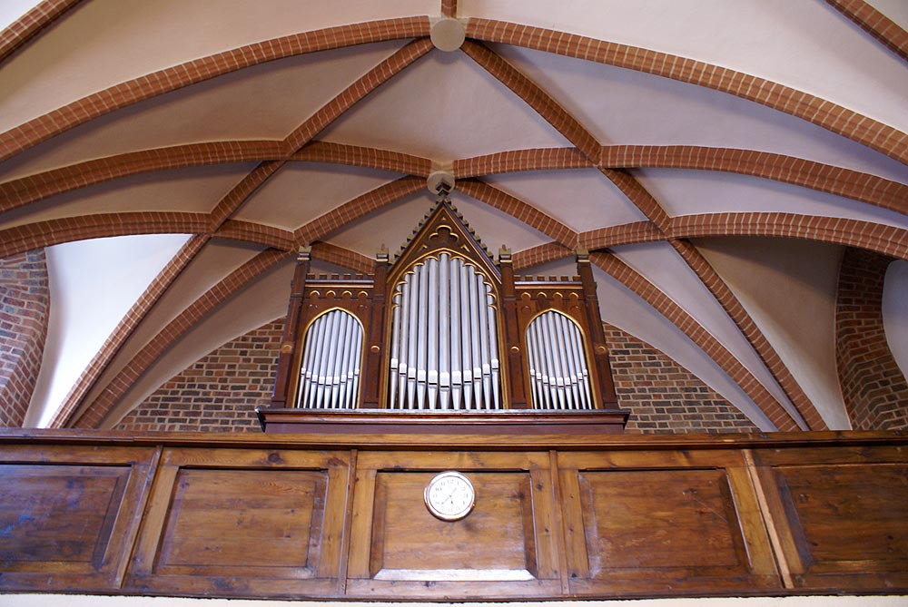 Kościół św. Krzysztofa pl. św. Krzysztofa 1, Miasto Wrocław - Stare Miasto